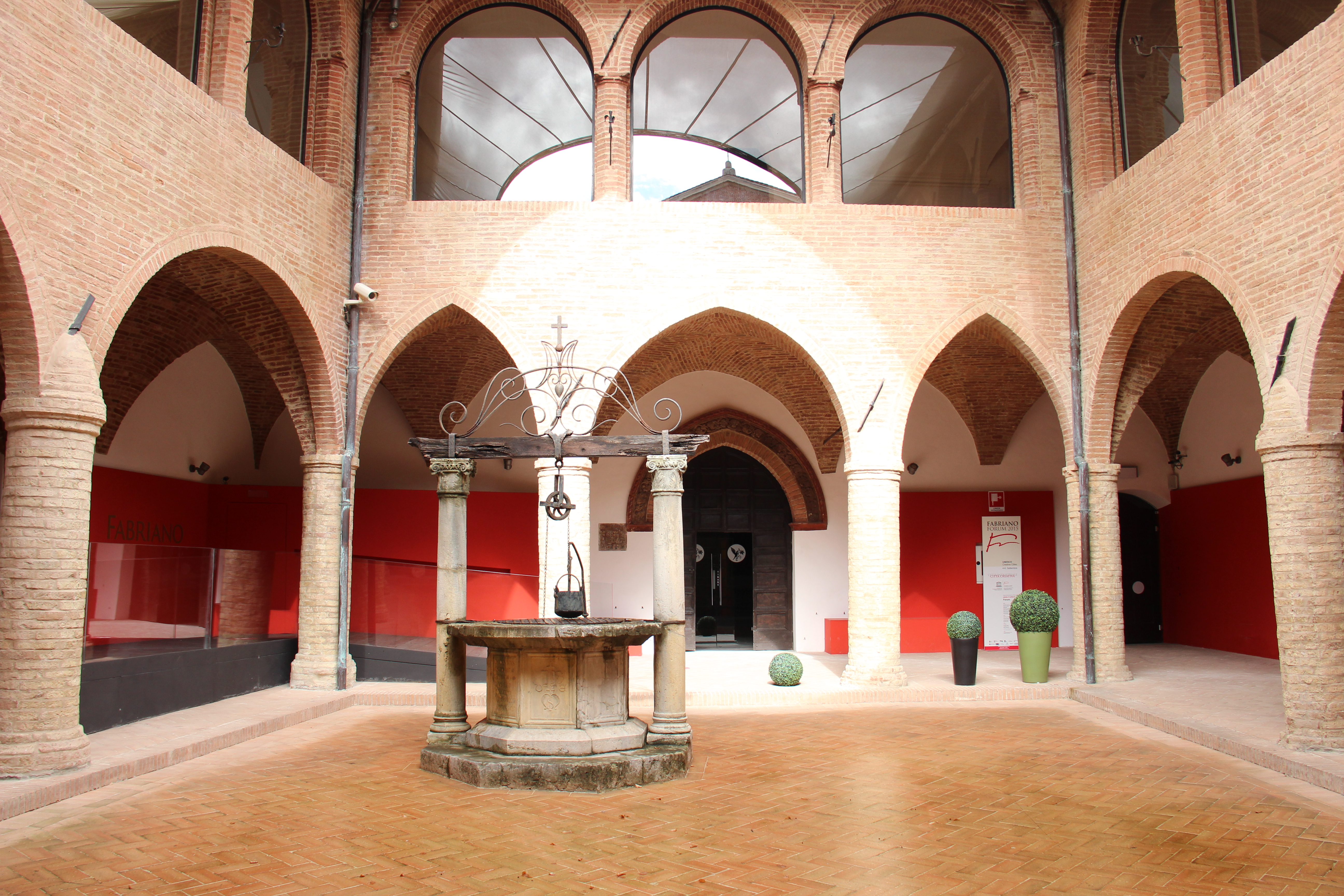 Spedale Santa Maria del Buon Gesù - Pinacoteca civica Bruno Molajoli (esterni e chiostro interno) This is a photo of a monument which is part of cultural heritage of Italy.